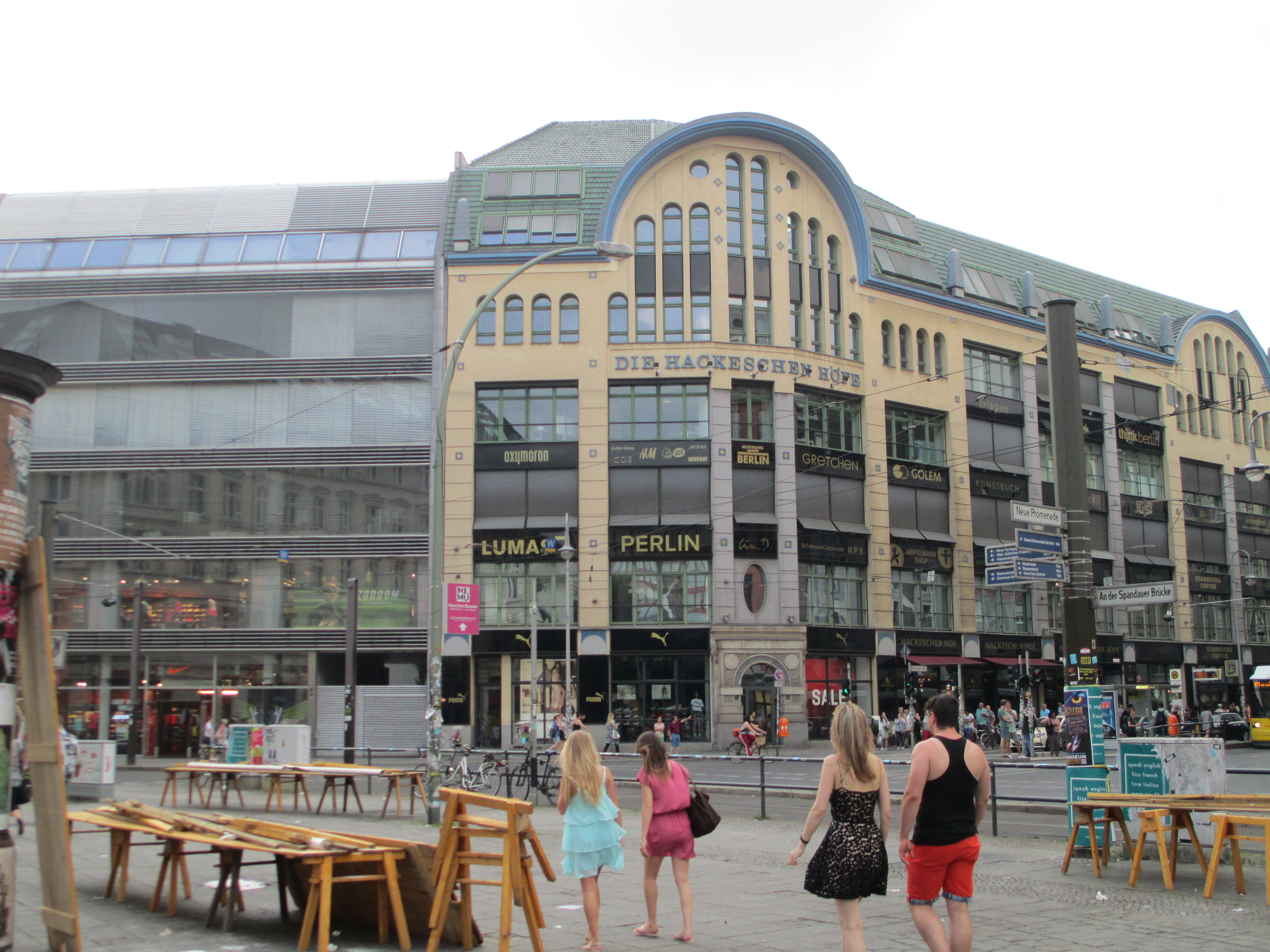 חצרות האקשה בברלין